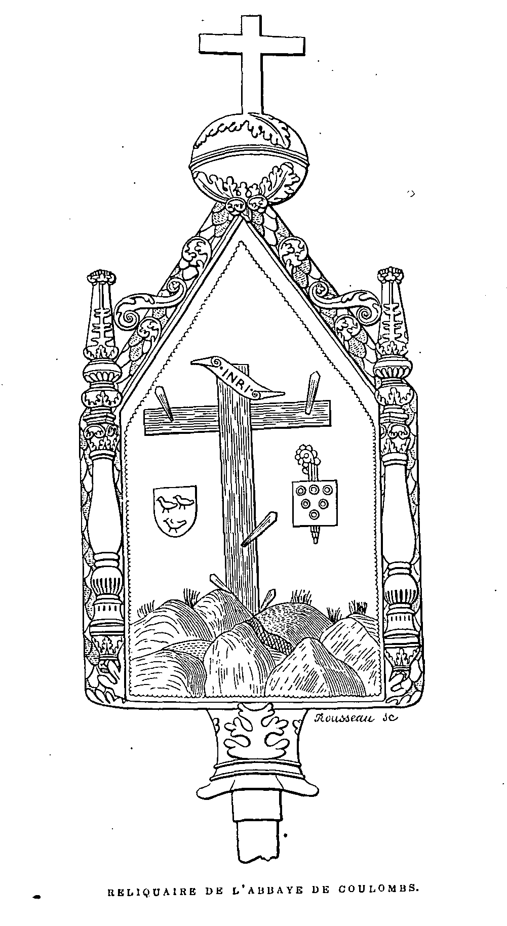 Reliquaire de l'abbaye de Coulombs, revers (vu de dos). L'abbaye est aujourd'hui en ruines. Il était conservé à l'église paroissiale Saint-Chéron de Coulombs, en 1864 lorsque Lucien Merlet l'a observé et lorsque cette gravure fut publiée. Il est déposé depuis 1906 au trésor de la cathédrale de Chartres